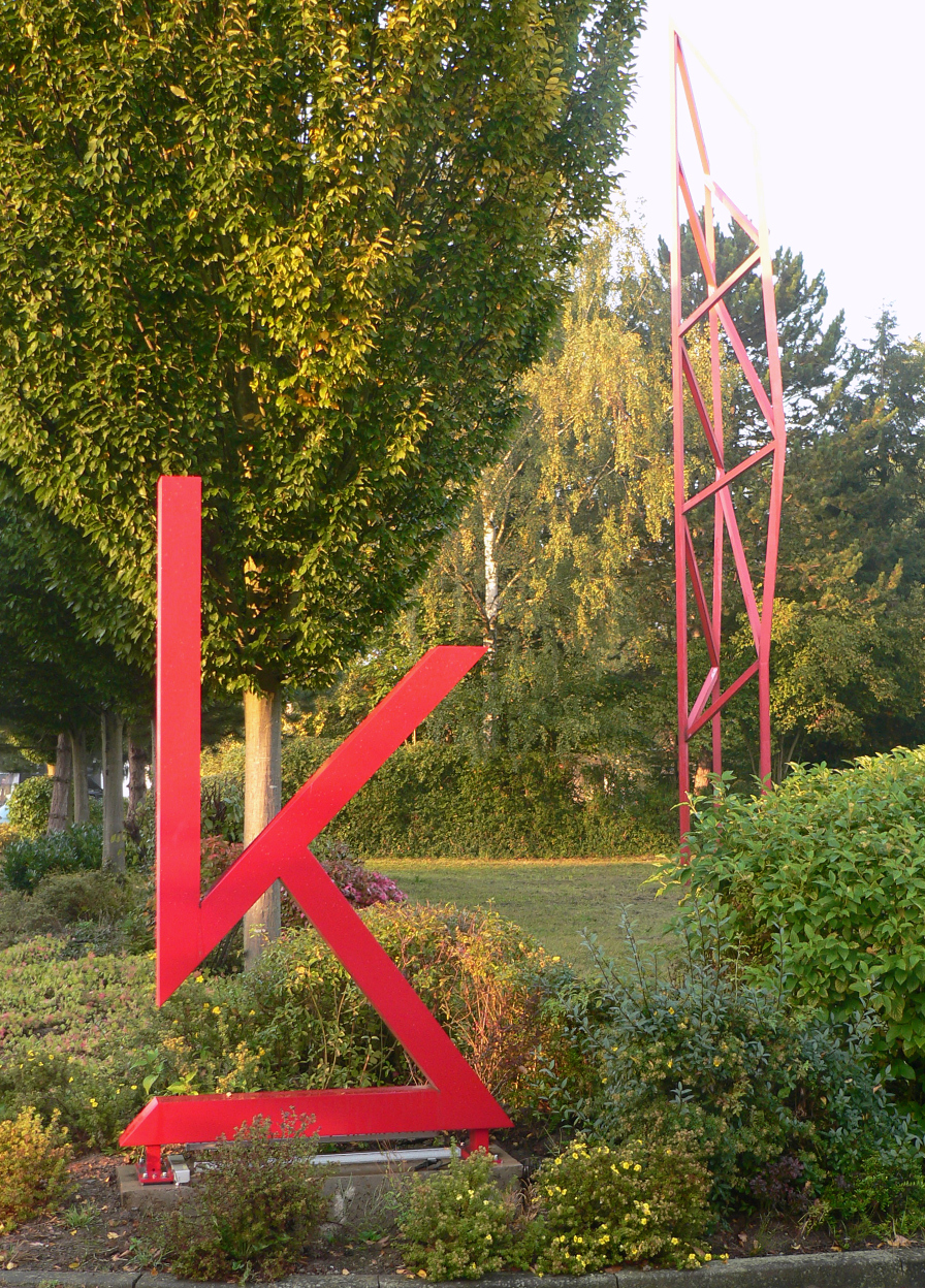 Kragstuhlmuseum